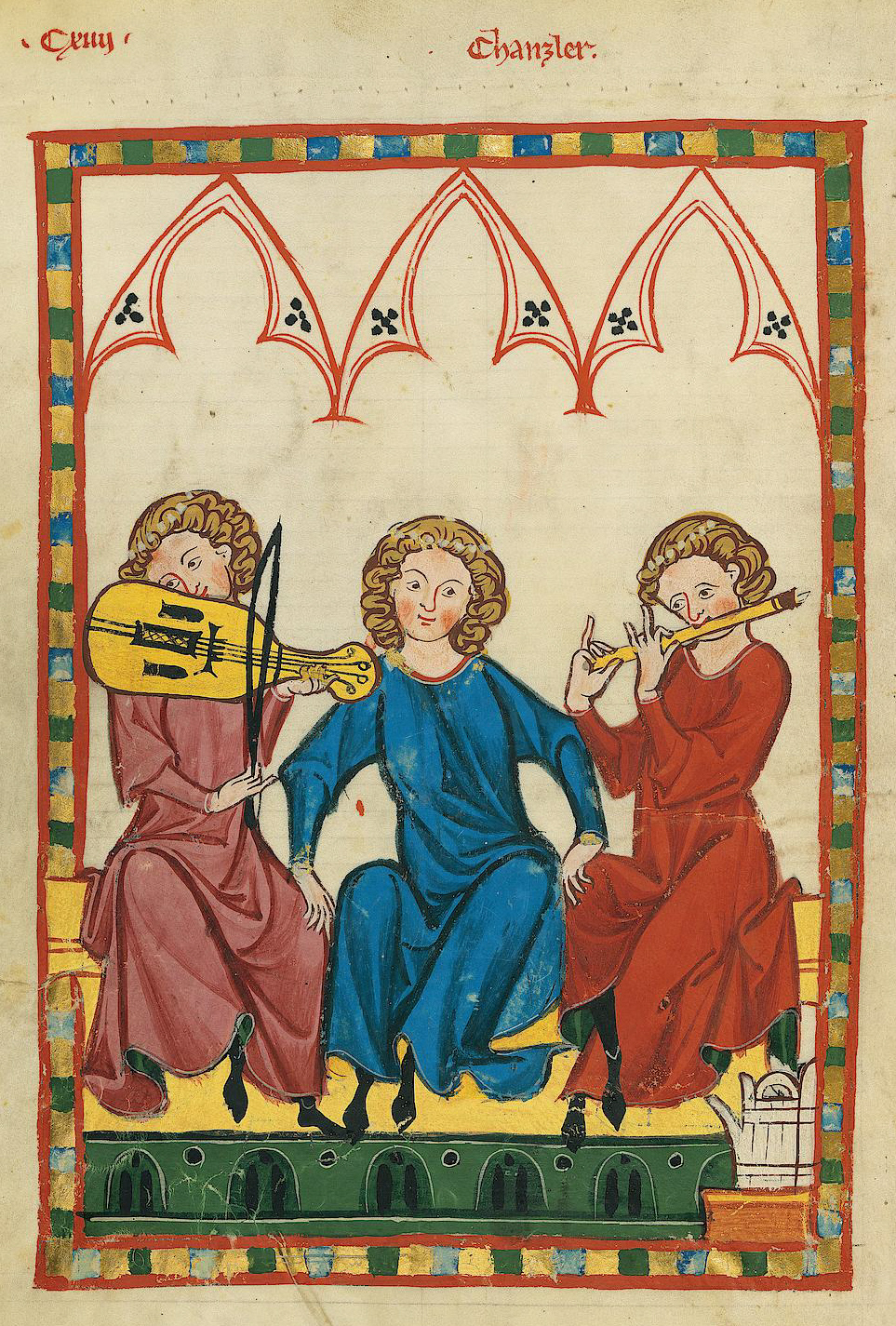 Codex Manesse, UB Heidelberg, Cod. Pal. germ. 848, fol. 423v: Der Kanzler